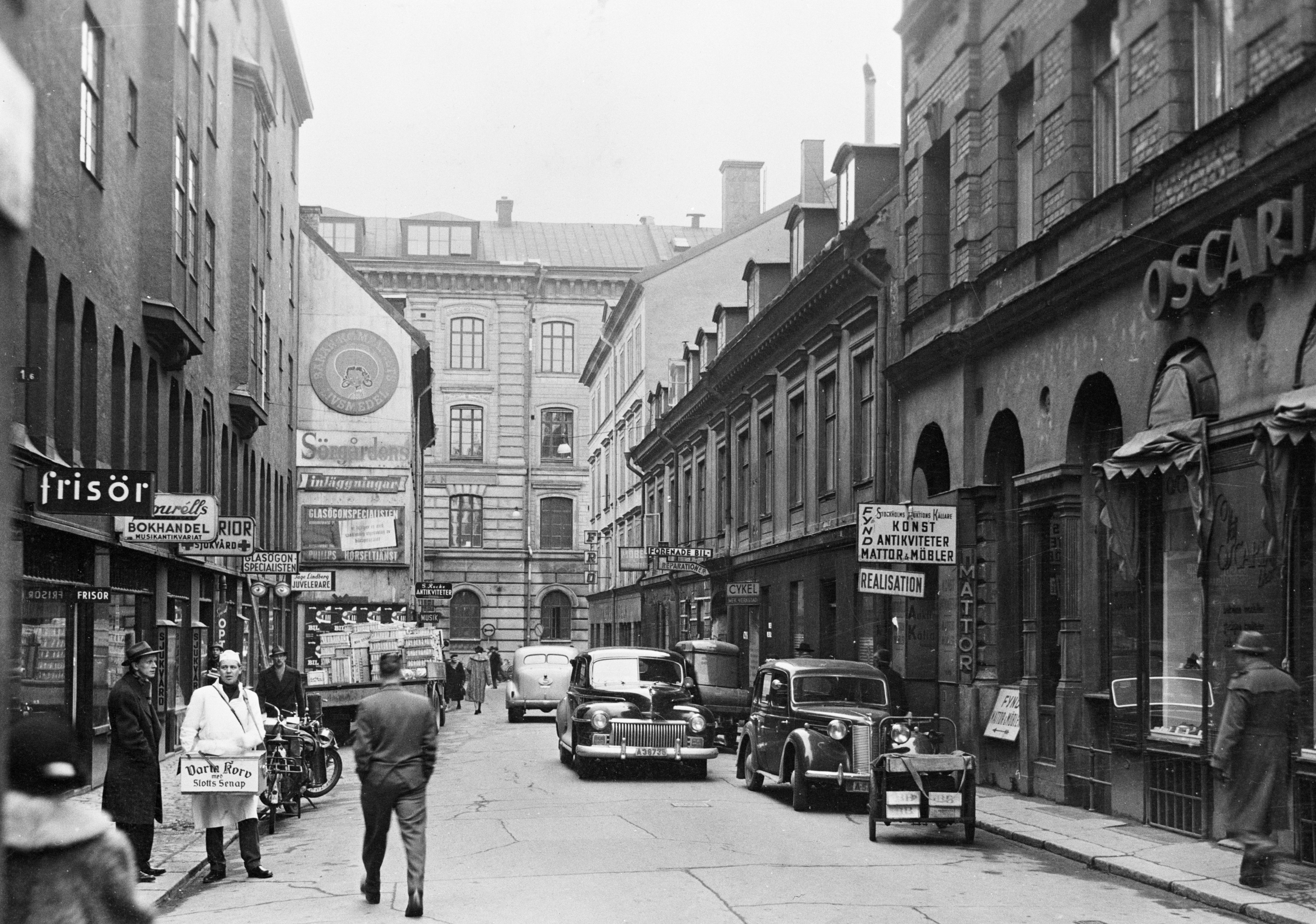 Beridarebansgatan norrut mot gamla Konstfacksskolan. En varmkorv-försäljare står vid trottoaren